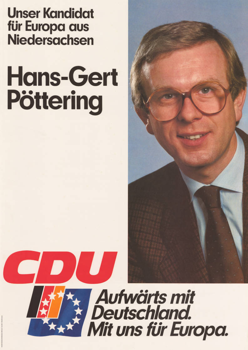 Unser Kandidat für Europa aus Niedersachsen Hans-Gert Pöttering CDU Aufwärts mit Deutschland. Mit uns für Europa. Abbildung: Porträtfoto Plakatart: Kandidaten-/Personenplakat mit Porträt Auftraggeber: Verantw.: Niedersachsen-CDU, Hannover Drucker_Druckart_Druckort: Willy F.P. Fehling GmbH, Hannover Objekt-Signatur: 10-030 : 168 Bestand: Europawahlplakate (10-030) GliederungBestand10-18: Europawahlplakate (10-030) » Europawahl am 17.6.1984 » CDU Lizenz: KAS/ACDP 10-030 : 168 CC-BY-SA 3.0 DE